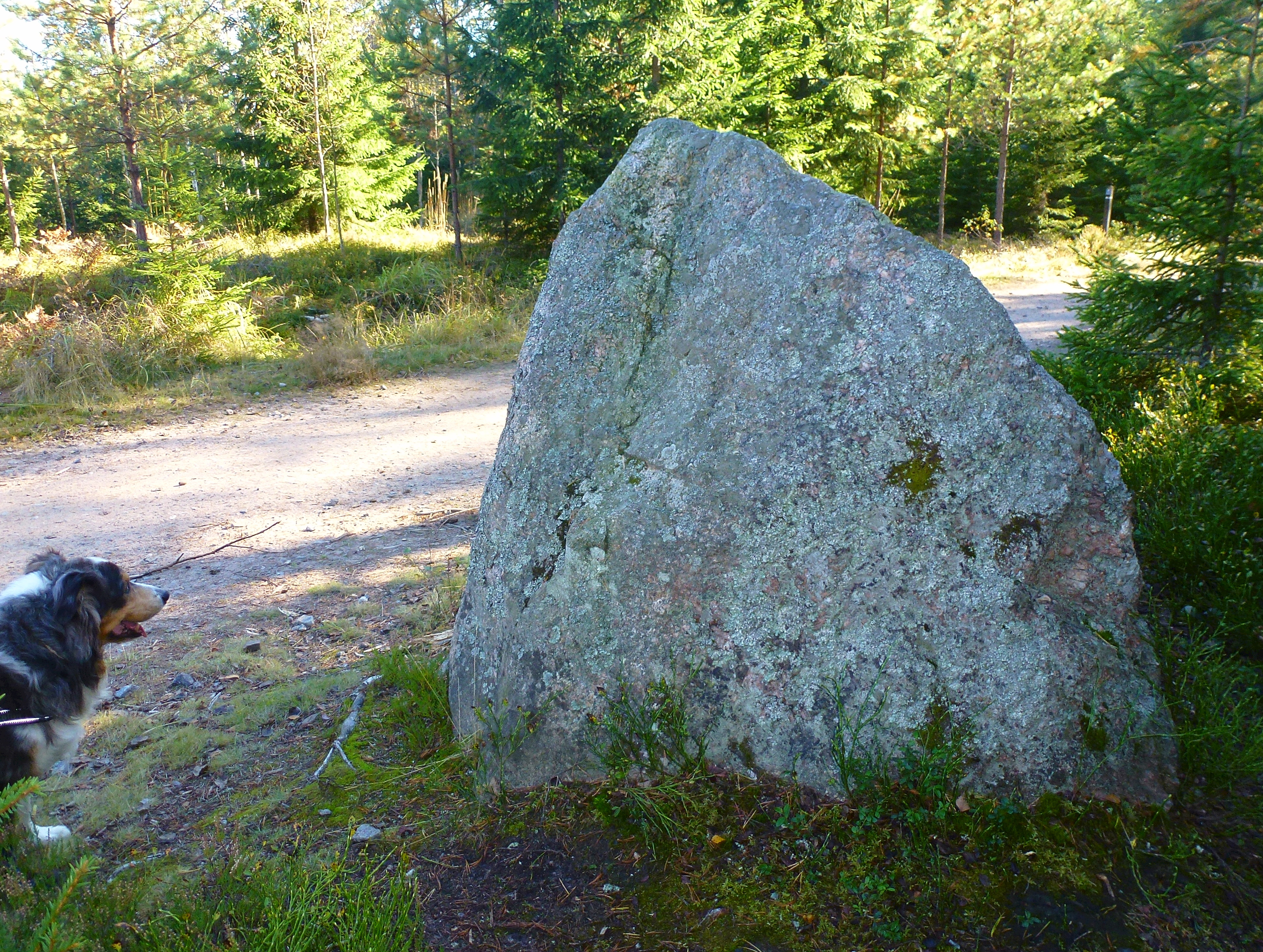 Tandvärksstenen (RAÄ-nummer Nacka 246) i Strålsjön – Erstavik naturreservat